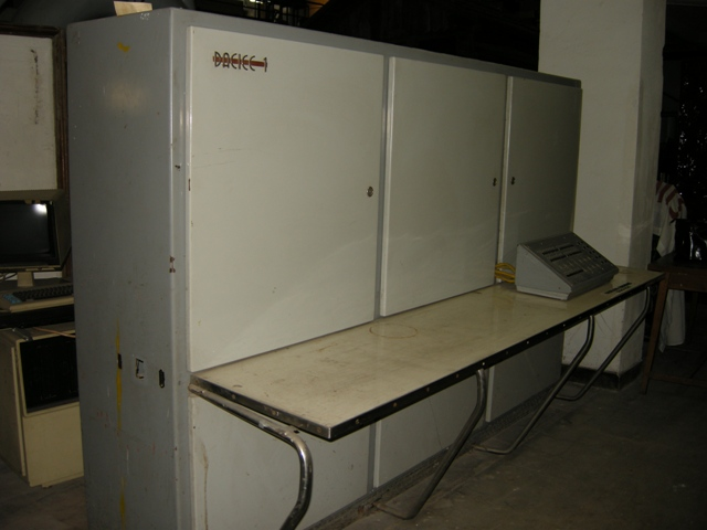 Calculatorul DACICC-1.Sursă foto: Gheorghe Farkas